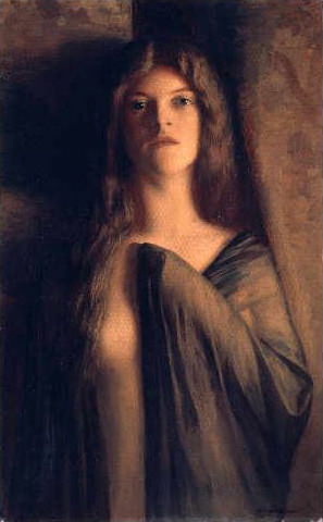 Bildnis einer jungen Frau (Öl auf Leinwand, 47,5 × 75,5 cm) von Max Nonnenbruch